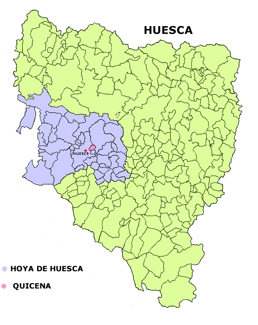 Mapa del municipio de Quicena Creado el 08.12.2005 por Dionisio en base a Image:Huesca municipalities.png